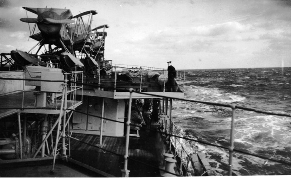 Flygstationen på flygplankryssaren Gotland